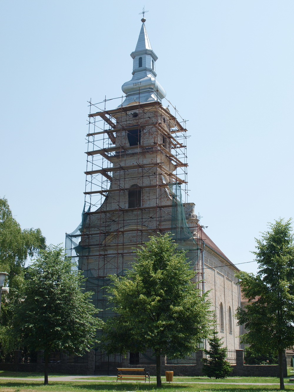 Crkva rođenja sv. Ivana Krstitelja u Vrpolju (obnova), Brodsko-posavska županija.